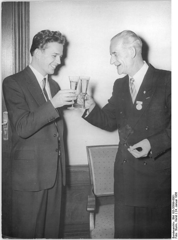 Berlin, Lessing-Medaille an Hacks und Erpenbeck Zentralbild-Sturm 24.1.1956 Verleihung der Lessing-Medaille im Ministerium für Kultur Am 24.1.1956 wurde der Lessingpreis 1956 an die Herren Dr. Peter Hacks und Fritz Erpenbeck durch den Minister für Kultur, Dr. h.c. Johannes R. Becher, verliehen. Zum ersten Mal konnte dieser Preis, der aus zwei Teilen, dem dramatischen und dem literaturkritischen, besteht, voll verliehen werde. Dr. Peter Hacks erhielt für seine Werke "Eröffnung des indischen Zeitalters" und "Die Schlacht bei Lobesitz" den dramatischen Lessingpreis 1956, und Fritz Erpendeck erhielt für seine hervorragenden Leistungen auf dem Gebiete der Theaterkritik denliterakritischen Lessingpreis 1956. UBz: Die beiden Ausgezeichneten: Dr. Peter Hacks ( links) und Fritz Erpenbeck stoßen miteinander an. Abgebildete Personen: Hacks, Peter Dr.: Schriftsteller, DDR Erpenbeck, Fritz: Schriftsteller, Theaterkritiker, DDR (GND 116567635)